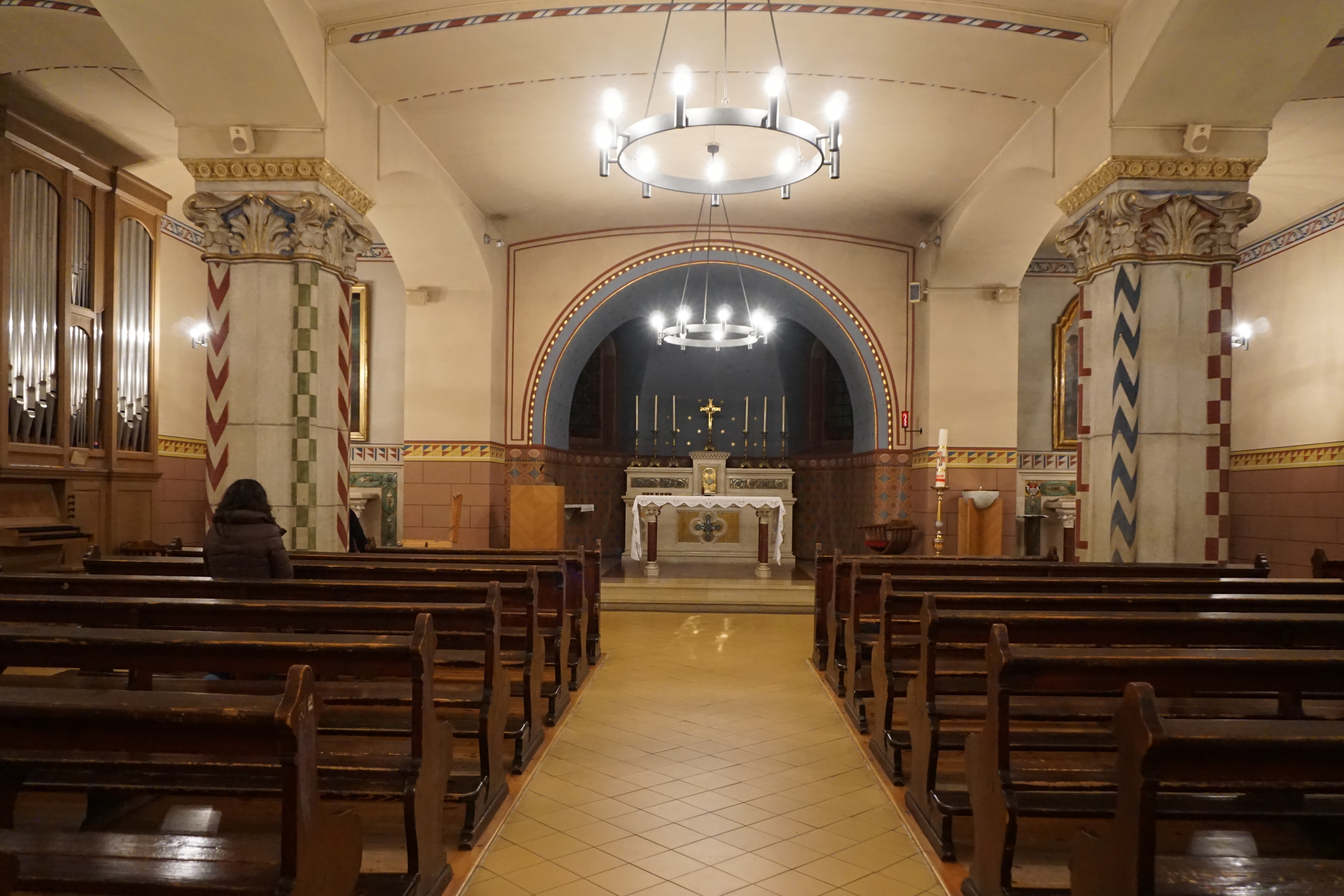 Dreifaltigkeitskirche Bern, Krypta, Übersicht.